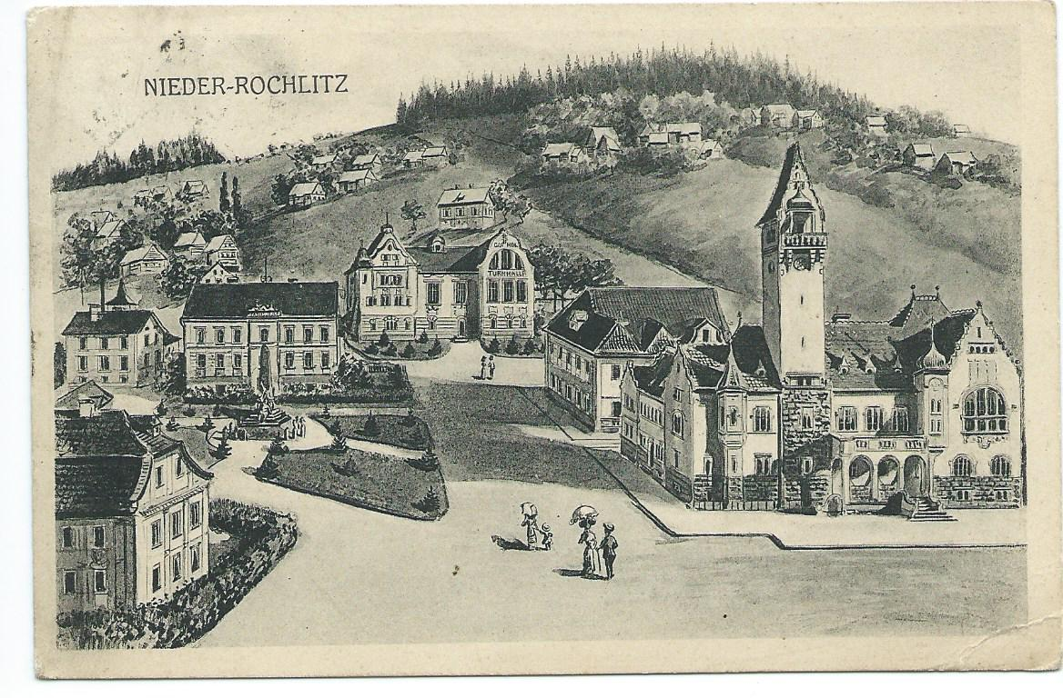 Stadtansicht Nieder-Rochlitz an der Iser, Böhmen 1912, Verlag Ernst Gernert,Kfm. Nied.-Rochlitz, Ansichtskarte